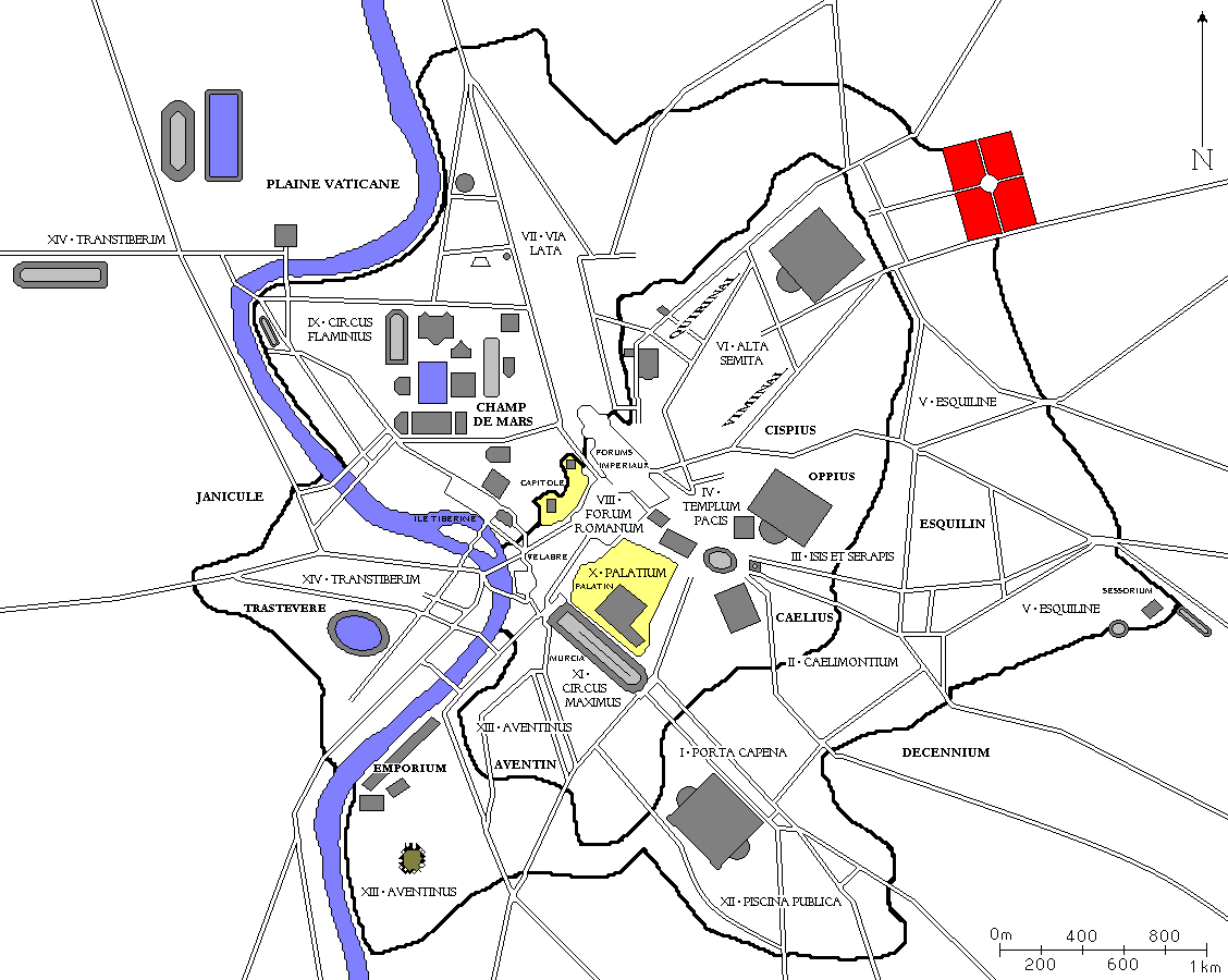 Plan de Rome redessiné à partir de diverses sources. Tous les bâtiments importants construits jusqu'à la fin de l'Empire romain sont dessinés, ainsi que les régions d'Auguste et les collines de Rome. Auteur : ColdEel En rouge, la Caserne de la Garde Prétorienne